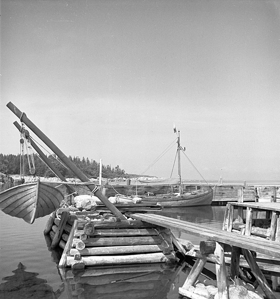 Lotsplats. Bild tagen på 1940-talet. Motiv: Brämön Nyckelord: Riksintressen Kategori: Fiskeläge, HamnmiljöerLotsplats. Bild tagen på 1940-talet.